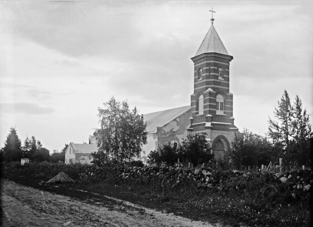 Кирха в деревне Молосковицы после ремонта 1902 года